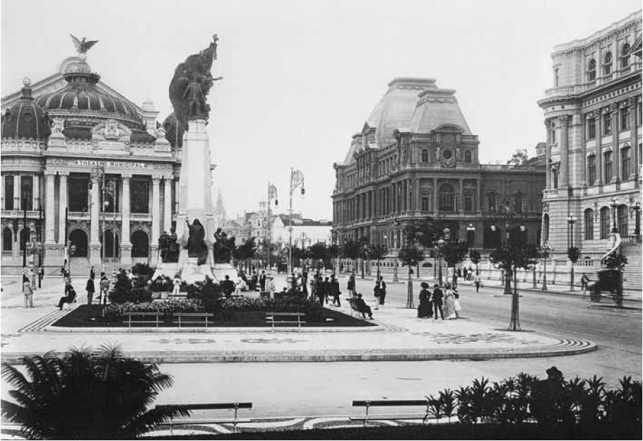 Avenida Central in Rio de Janeiro, Brazil.